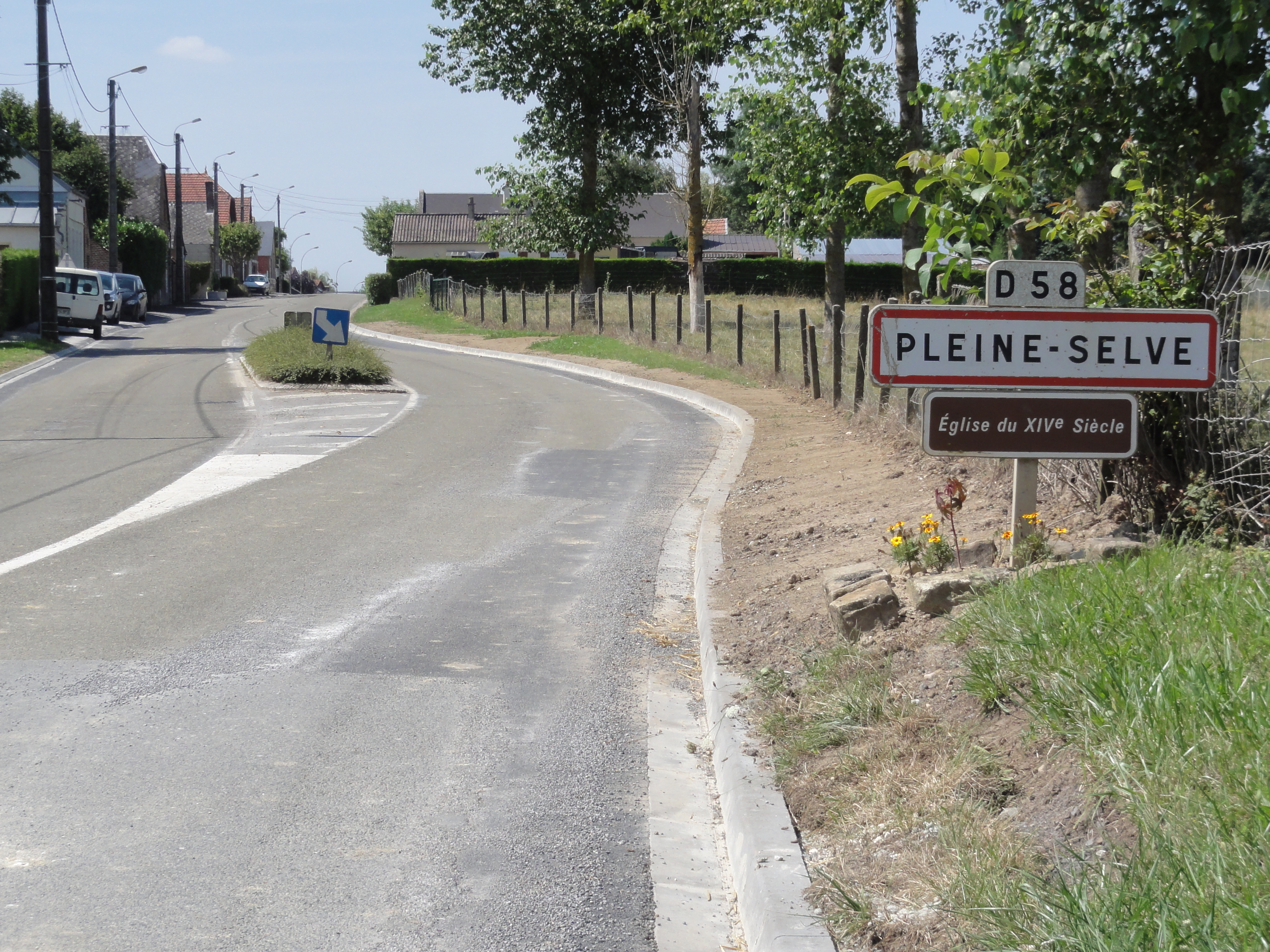 Pleine-Selve (Aisne) city limit sign